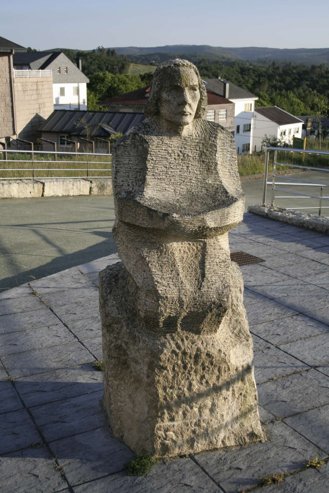 Monumento "La Esperanza del Regreso del Emigrante" de Maxín Picallo e hijo en Beariz.